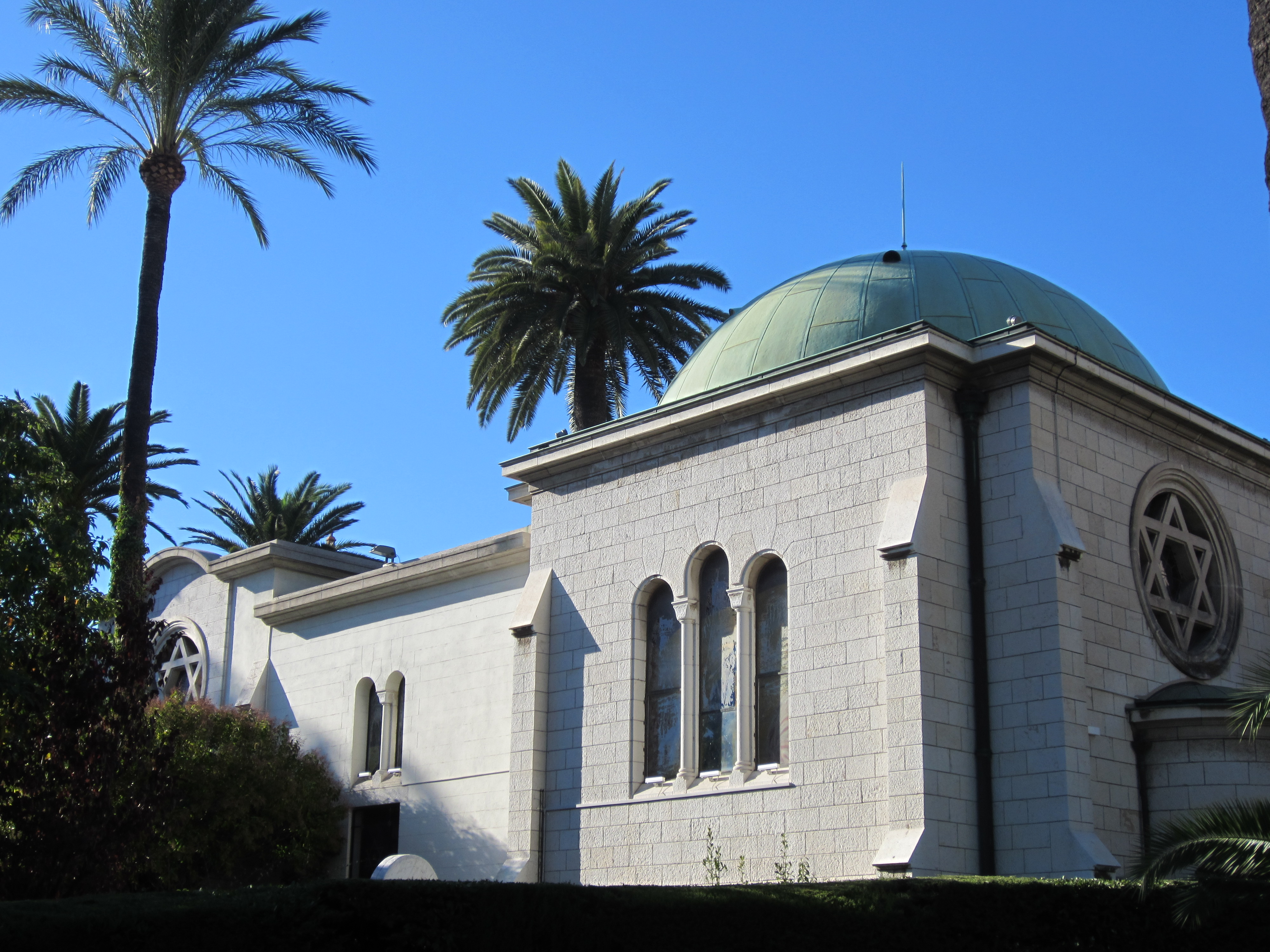 Description